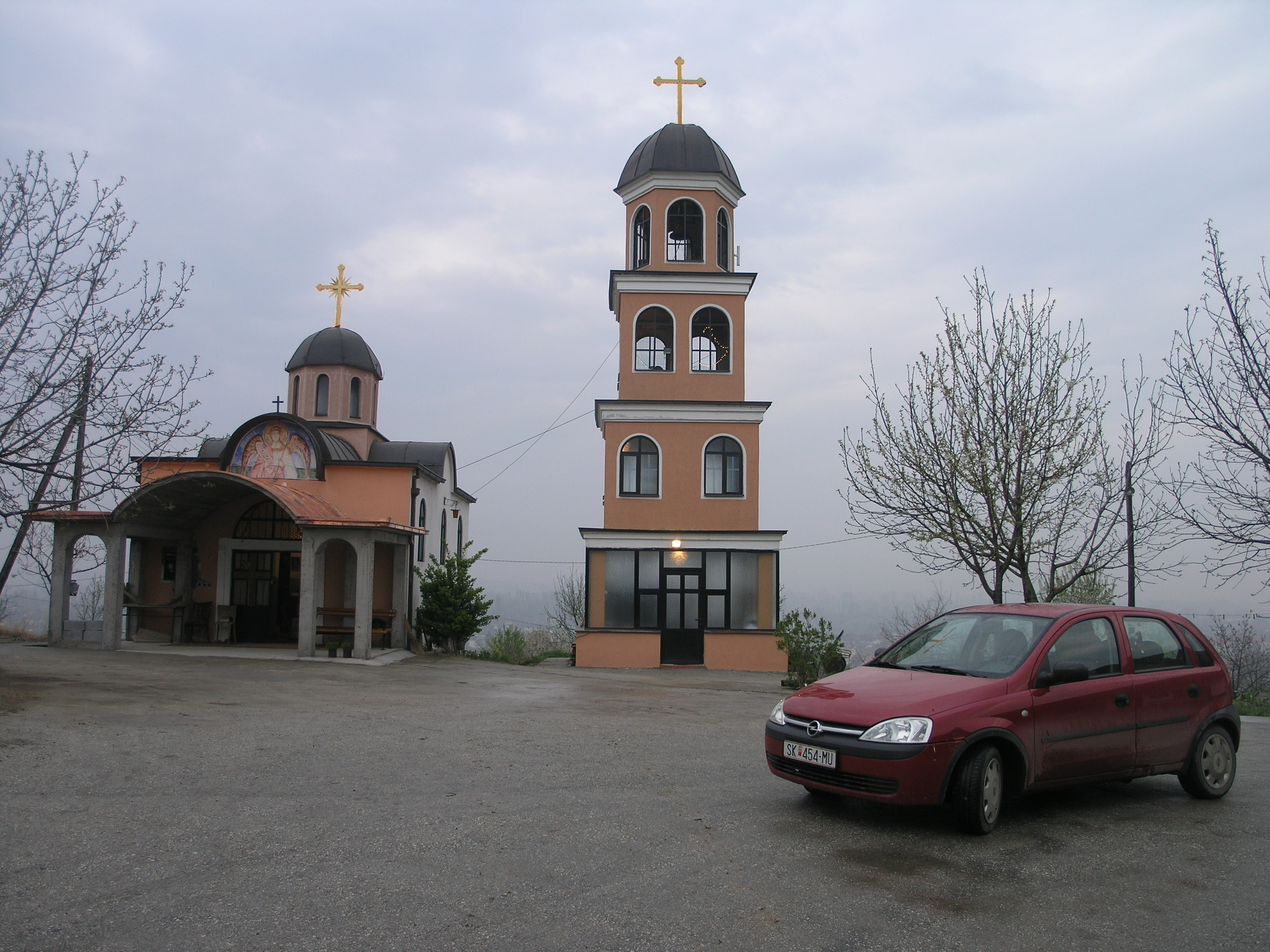 Манастирот Св.Архангел гаврил во Ново Село, Ѓорче Петров